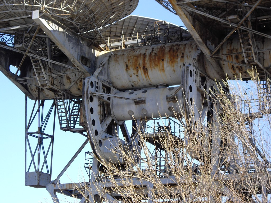 АДУ-1000. Бывшие опорно-поворотные устройства орудийных башен главного калибра суперлинкоров типа "Сталинград"